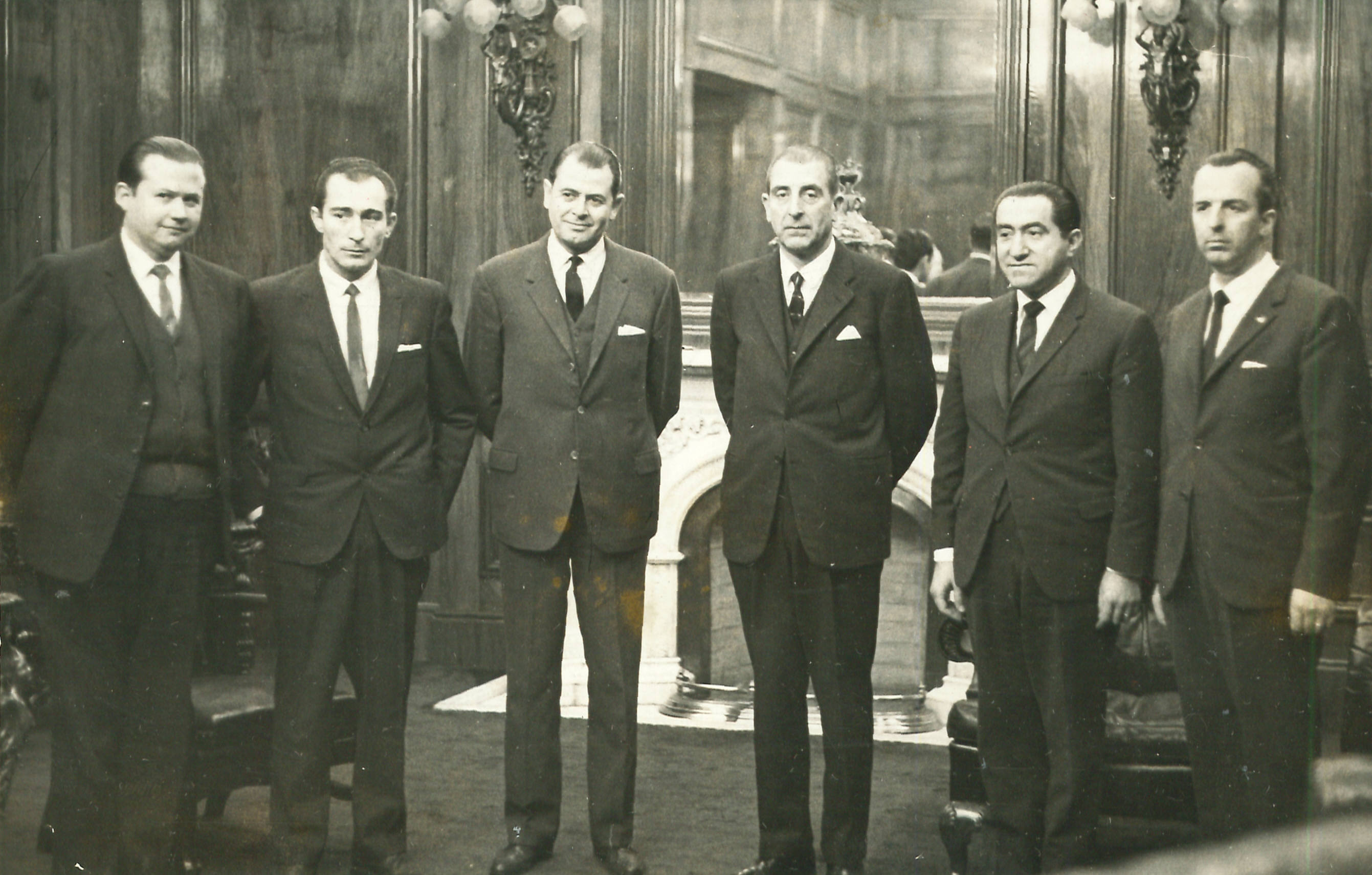 Directiva de la DC año 1965 Julio Montt, Félix Gajardo, Patricio Aylwin, Eduardo Frei Montalva, José Musalem.